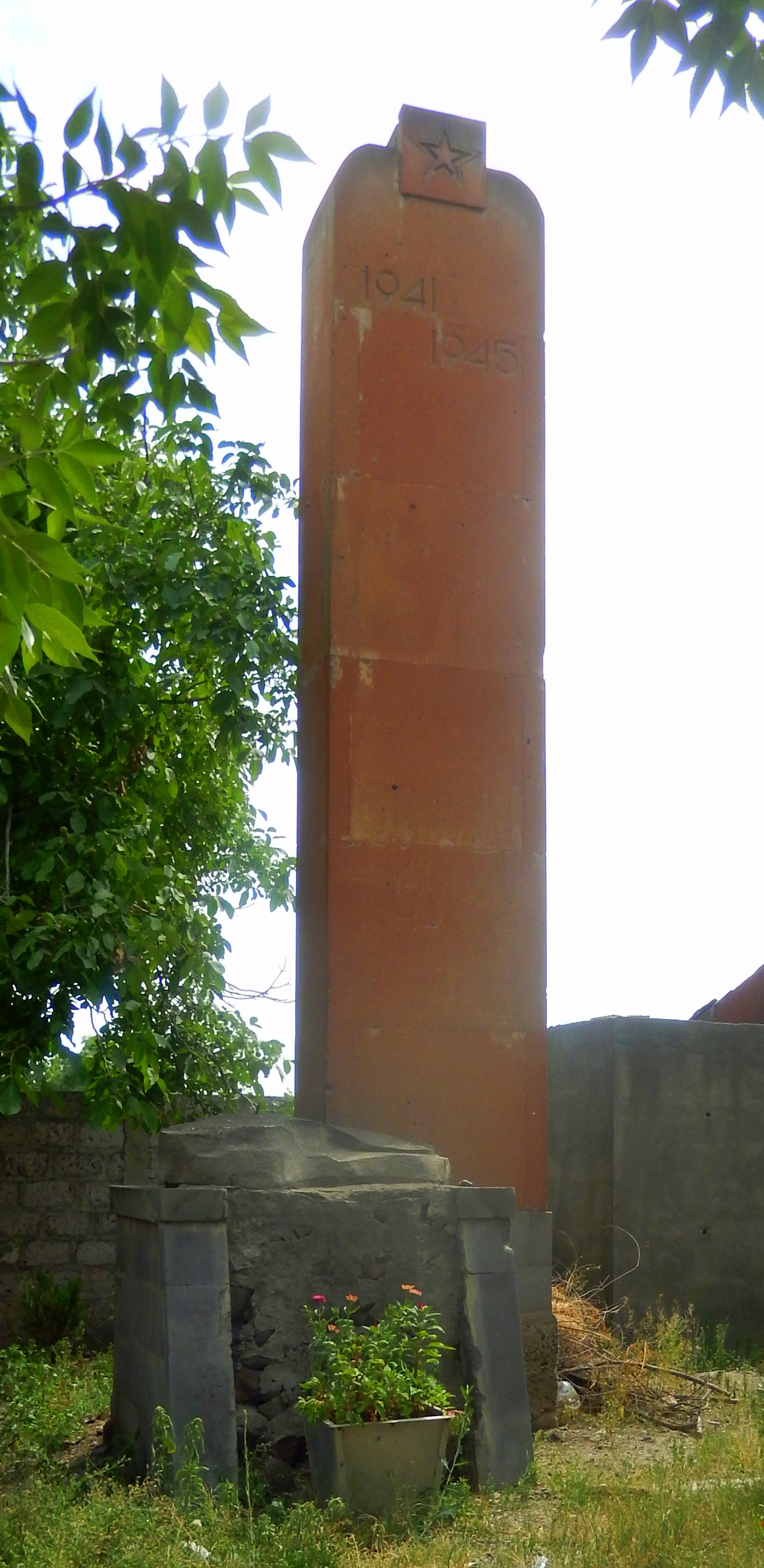 Հուշարձան Երկրորդ աշխարհամարտում զոհվածներին, Խաչփառ 50/